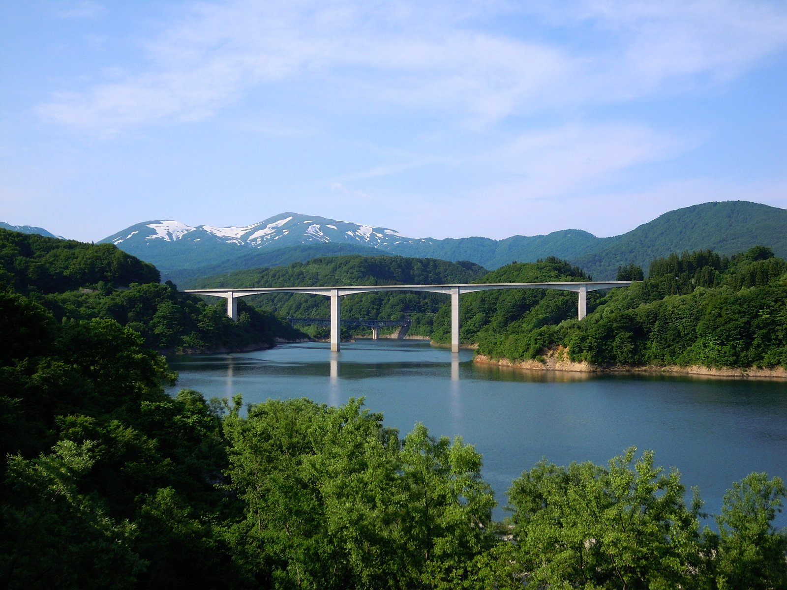 月山湖に架かる山形自動車道月山橋。遠方に見えるのは月山、奥の橋は国道112号線の大暮橋。